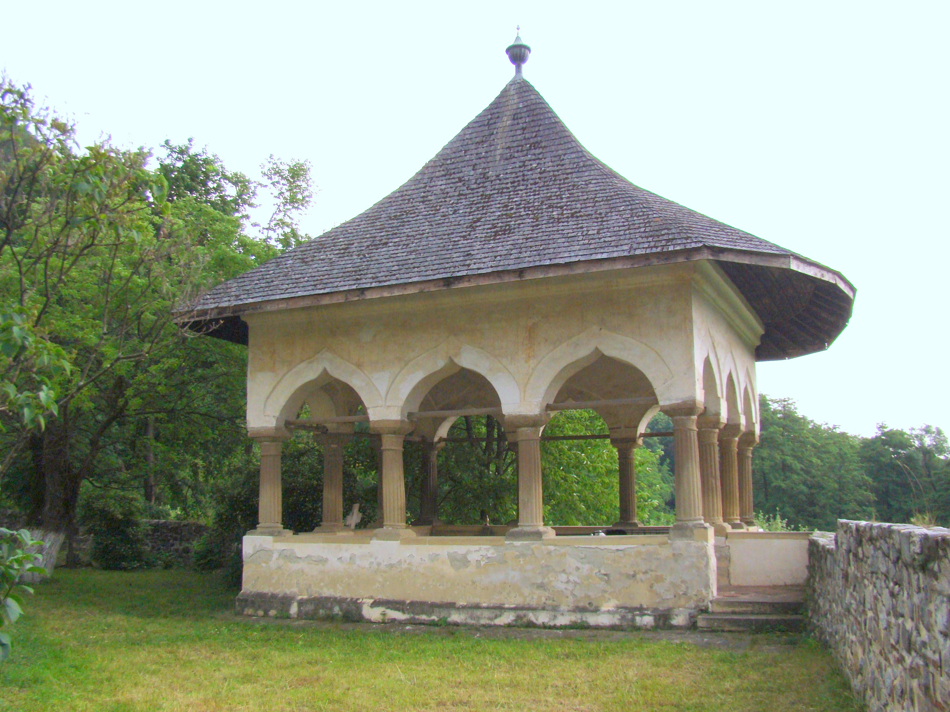 Bolnița „Adormirea Maicii Domnului”, Mănăstirea Hurezi, Vâlcea